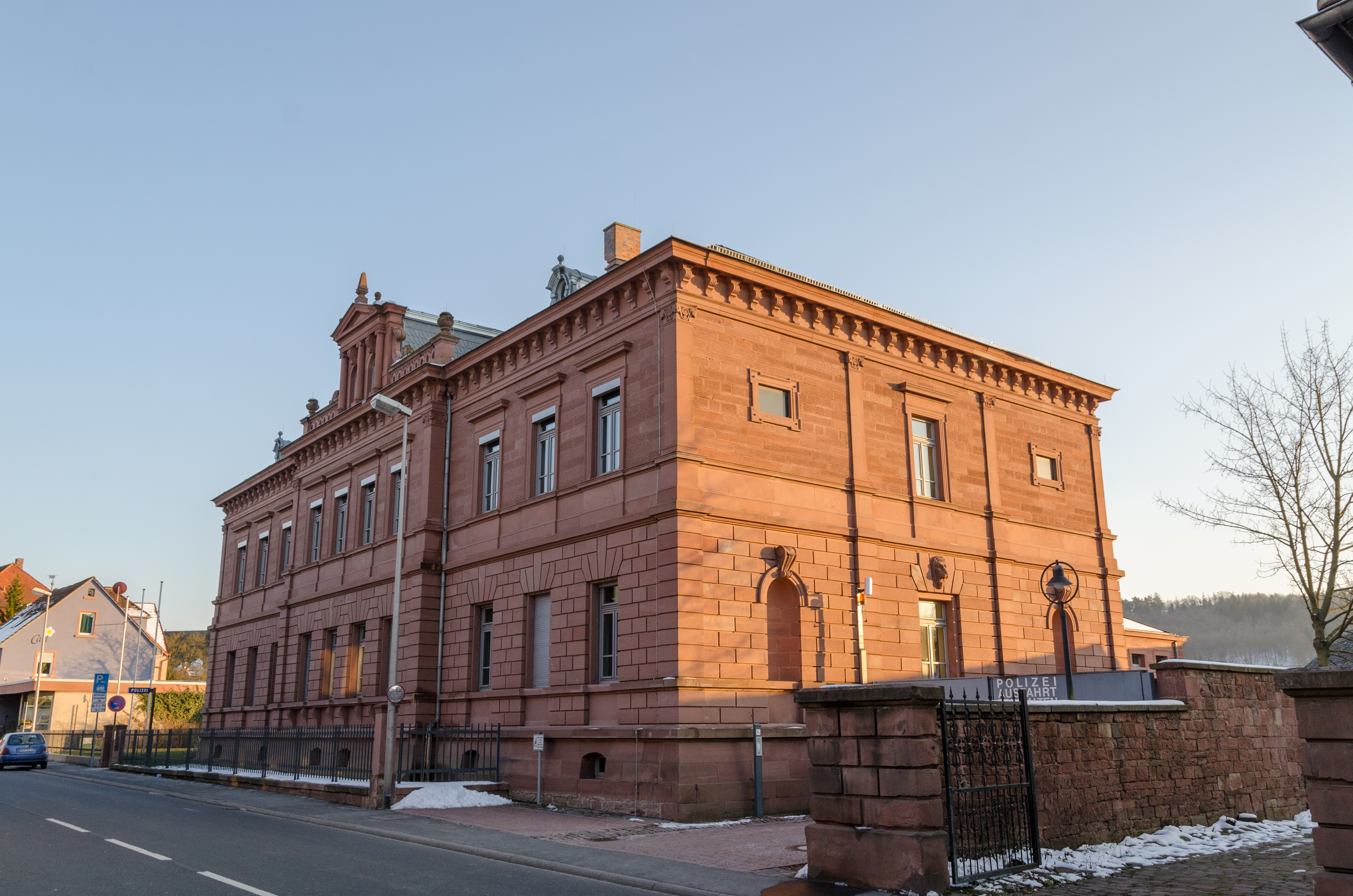 Marktheidenfeld, Würzburger Straße 6